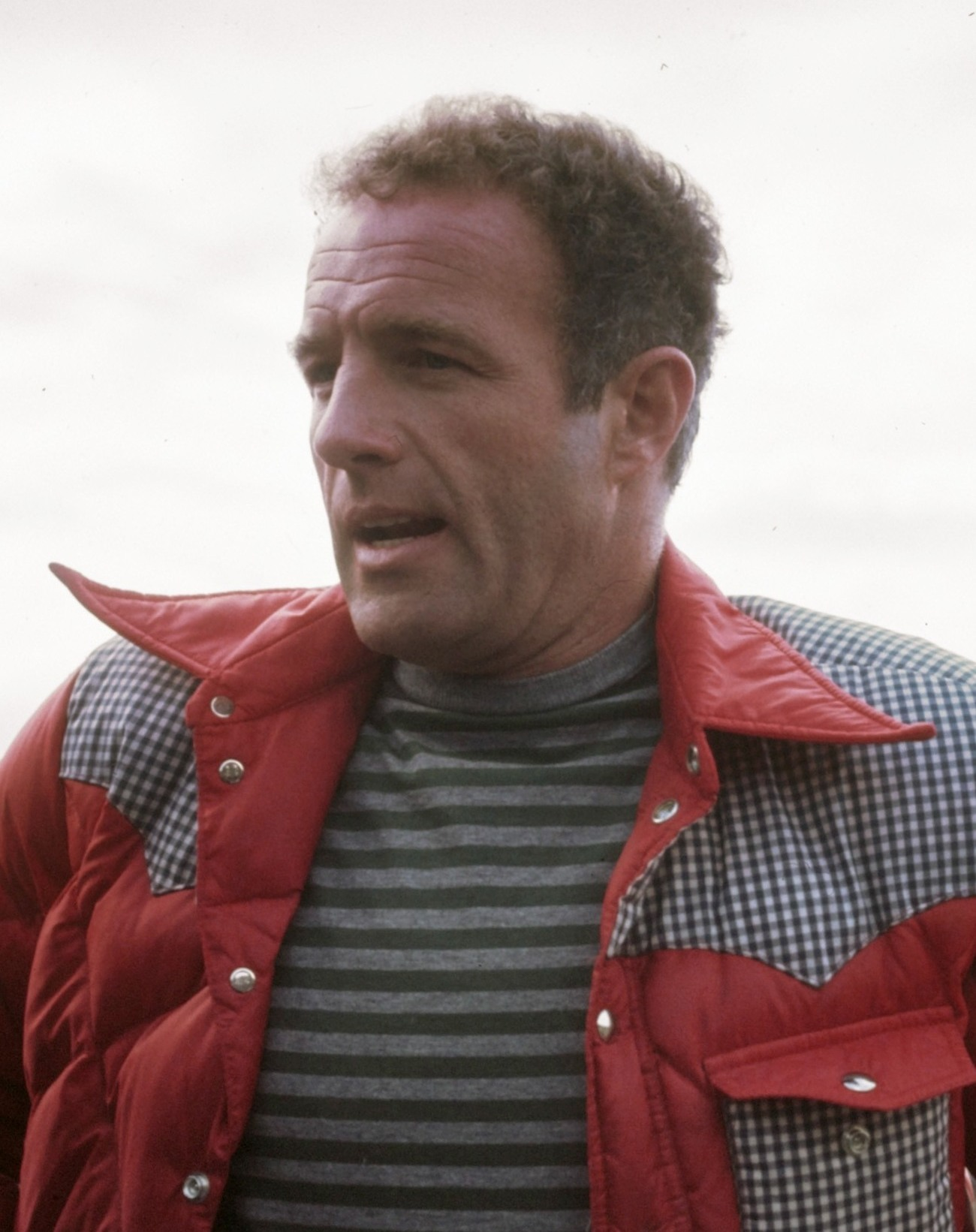 De filmacteur James Caan in Nederland voor opnamen van de film "Een Brug te ver' ("A Bridge too Far")